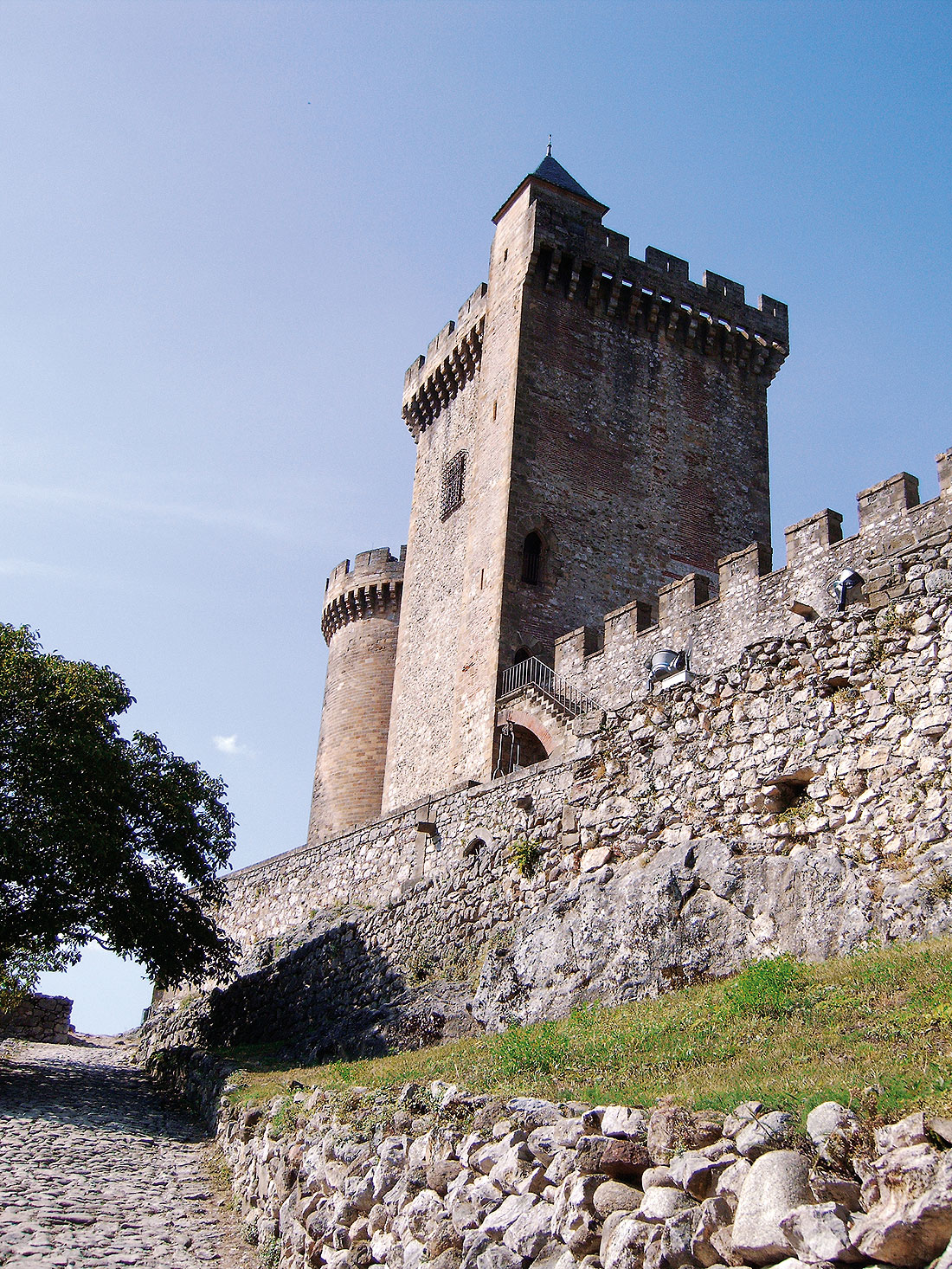 Le Château de Foix (Ariège, France).